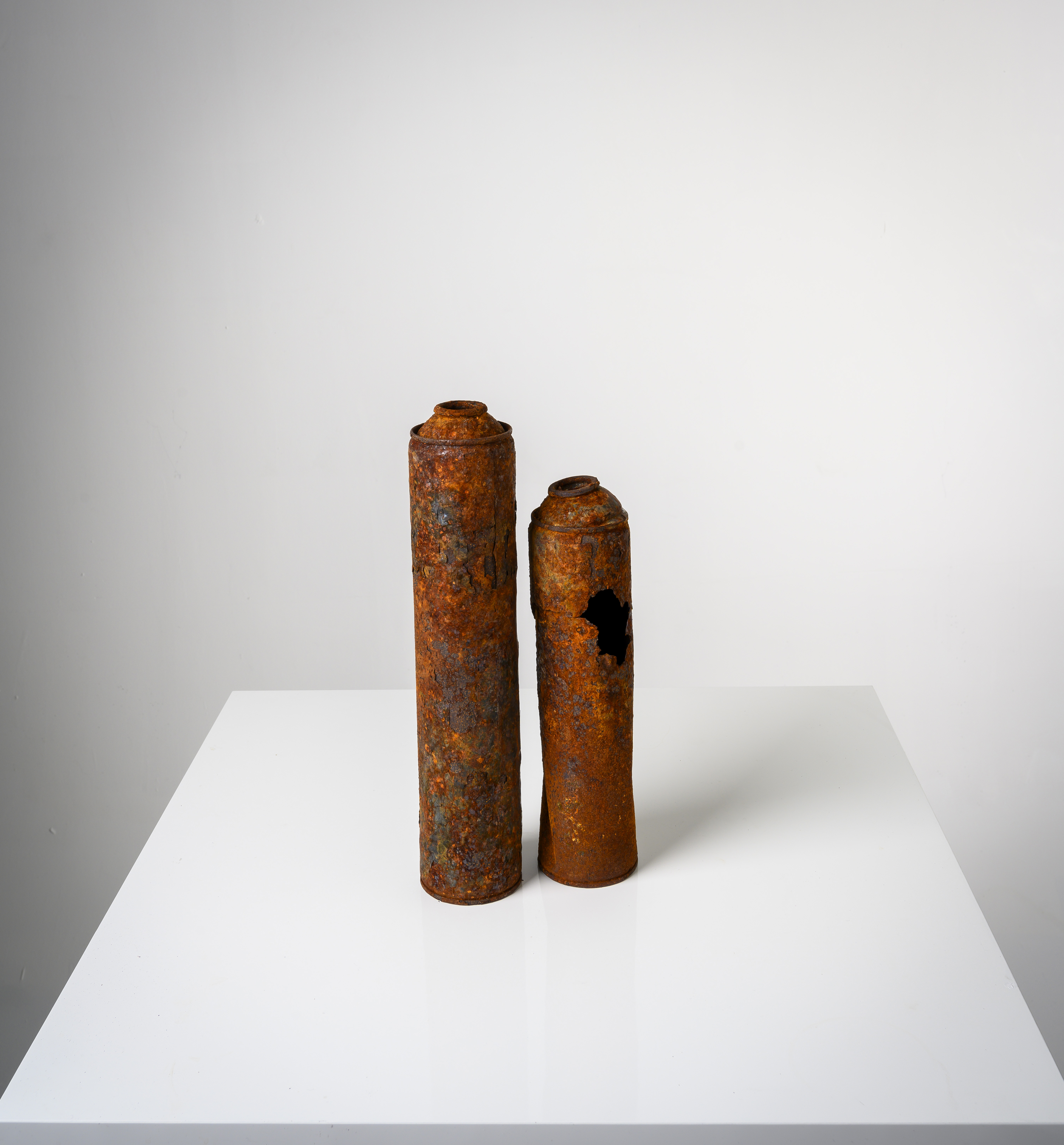 «Rusty Beauty VI». Installasjon av den norske kunsteren Beate Gjersvold. "Rustne gjenstander på vakkert underlag. Gjenstander som er på vei tilbake til naturen"